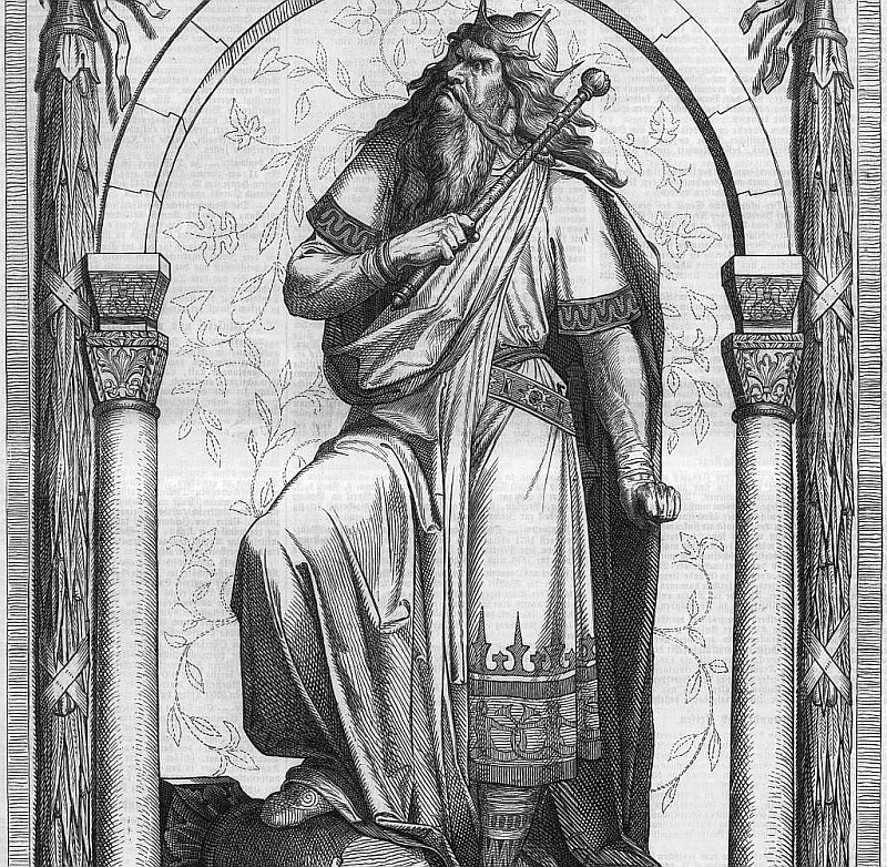 Wandalen-König Geiserich, Holzstich, 1869, nach Fresko von Julius Naue (1833–1907). Aus: Illustrirte Zeitung, 52. Bd., Nr. 1345, Leipzig, 10. April 1869, S. 269.